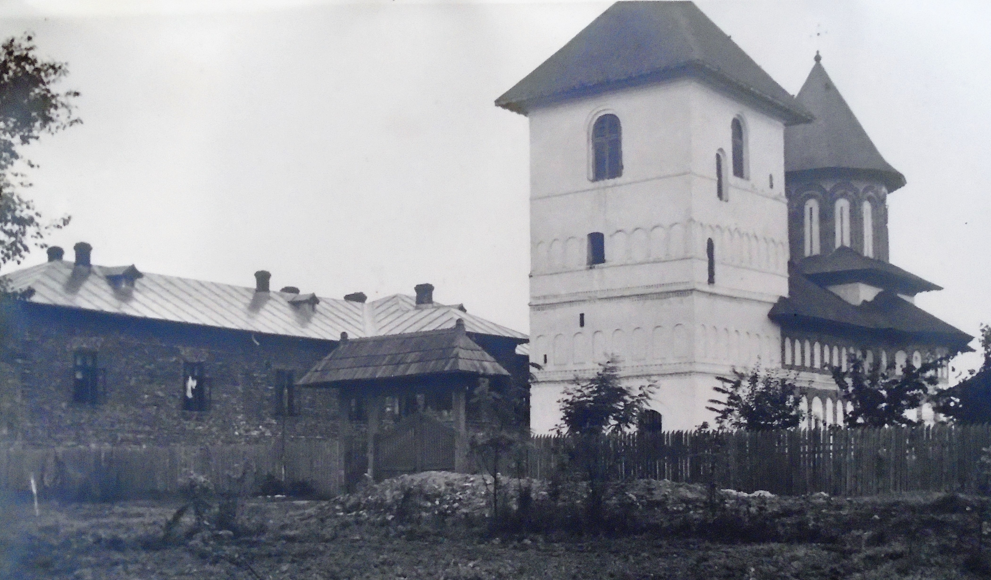 Mănăstirea Jitianu la mijlocul secolului al XX-lea